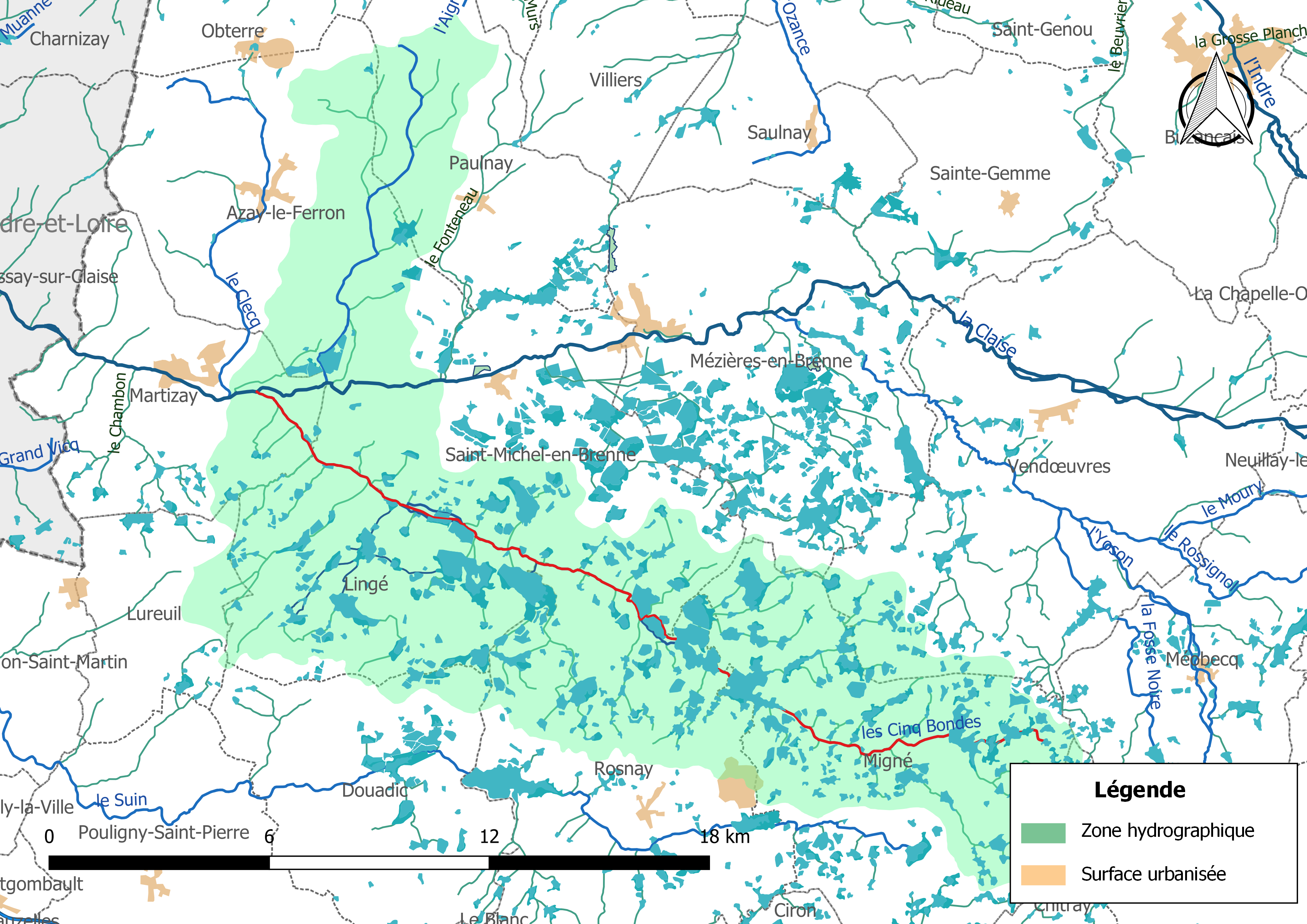 Carte du cours d'eau « les Cinq Bondes » (France) et de la zone hydrographique dans laquelle il s'insère.